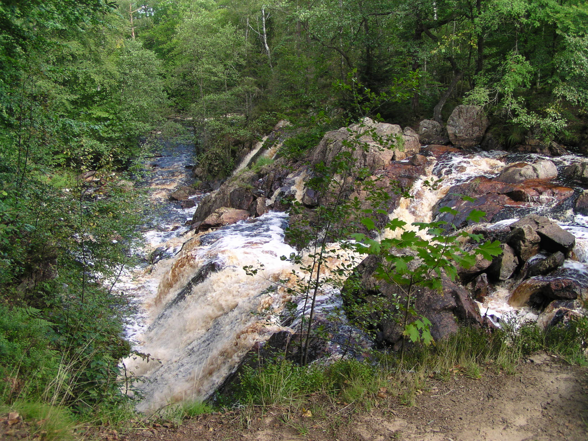 Vattenfallet Danska Fall